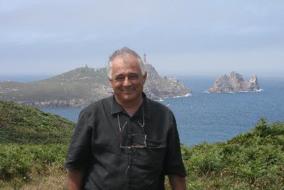 Josep M. Nadal